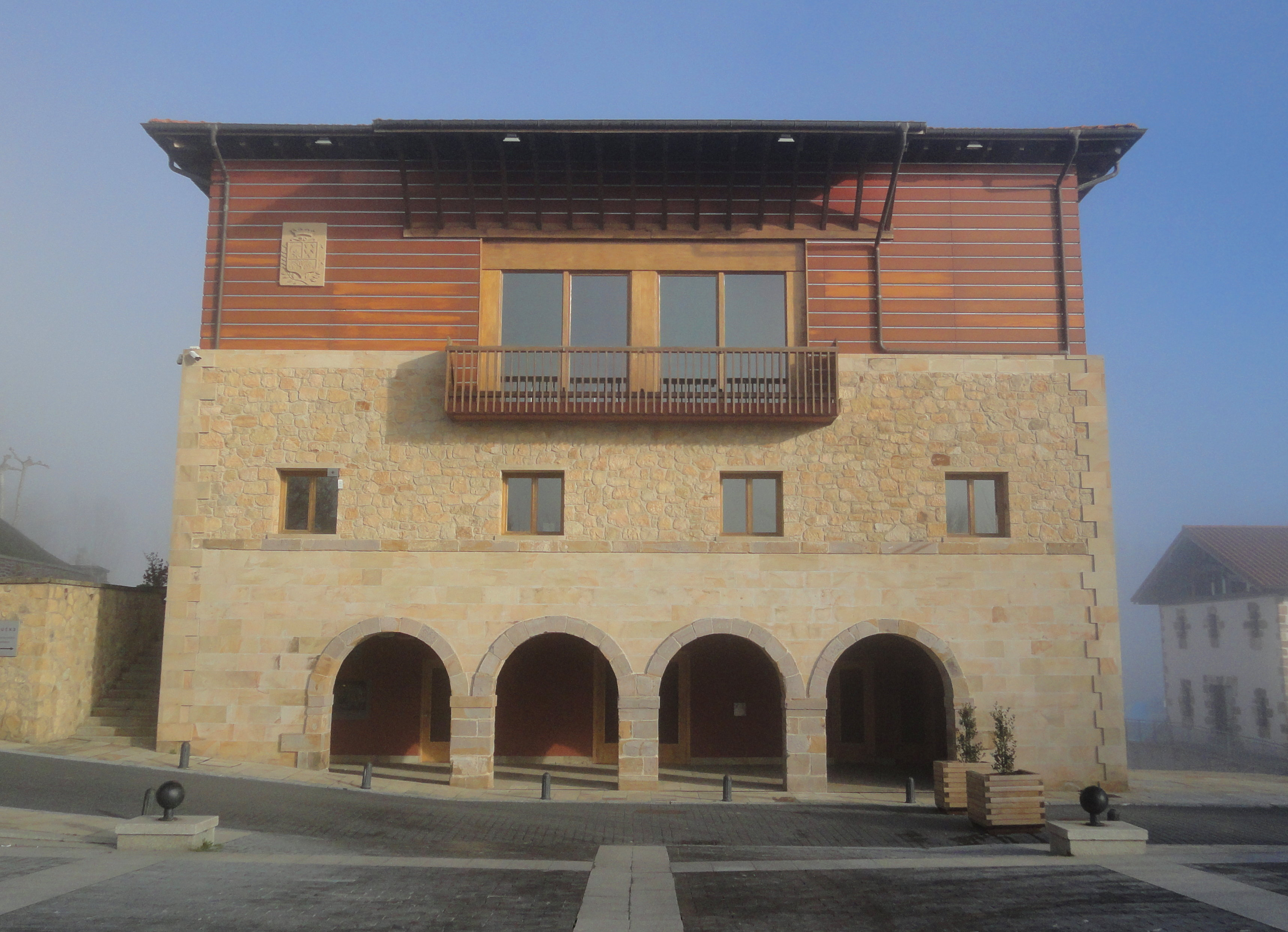 Olaberriko udaletxea